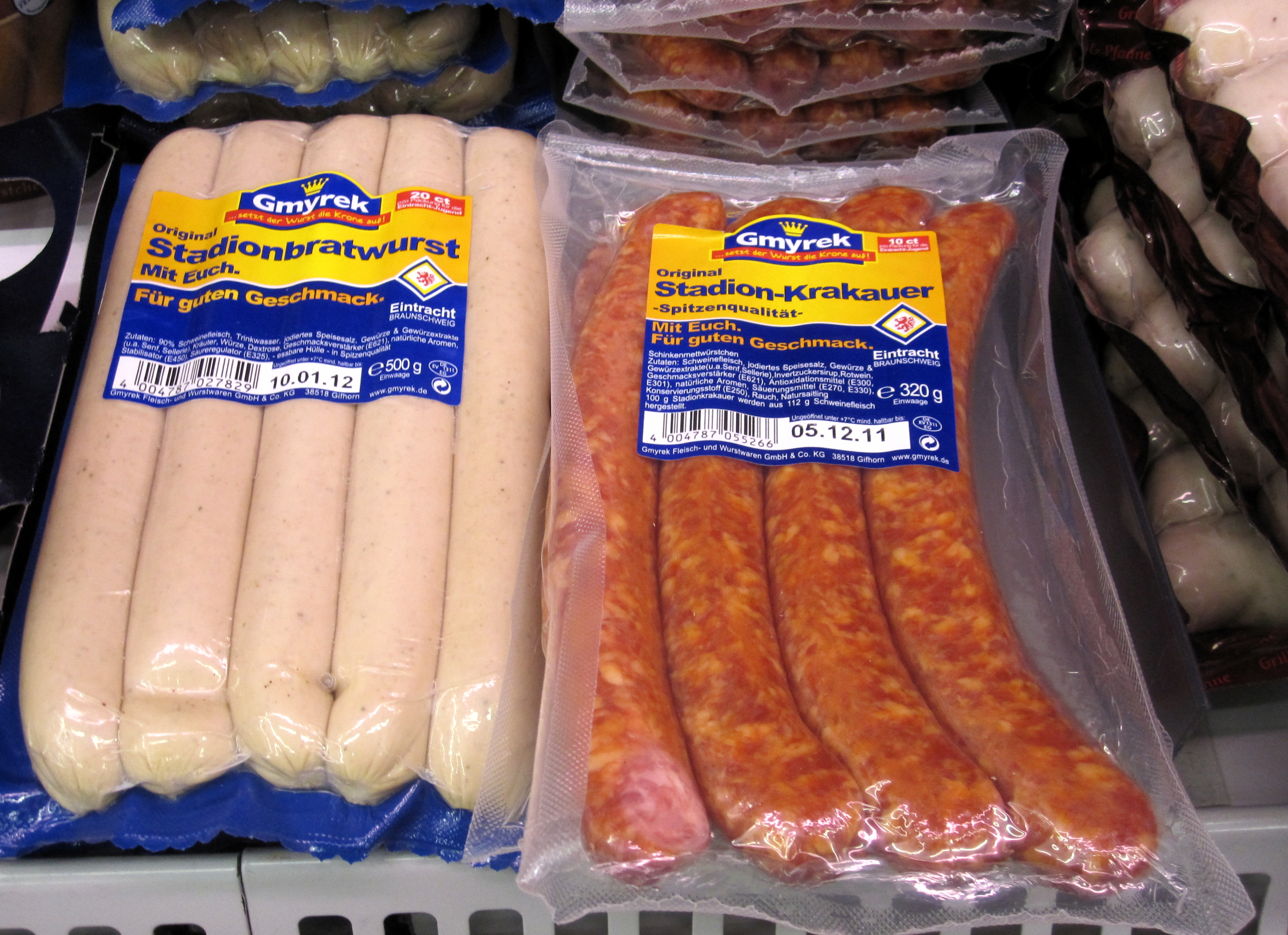 Im Stadion des Sportvereins Eintracht Braunschweig in Braunschweig verkaufte Stadionbratwurst und Stadion-Krakauer der Gifhorner Fleischerei Gmyrek. Mit einem Teil des Verkaufspreises wird die Jugendfußballmannschaft des Vereins unterstützt.